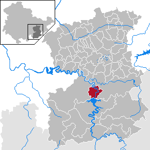 Burgk in Thuringia - Saale-Orla-Kreis